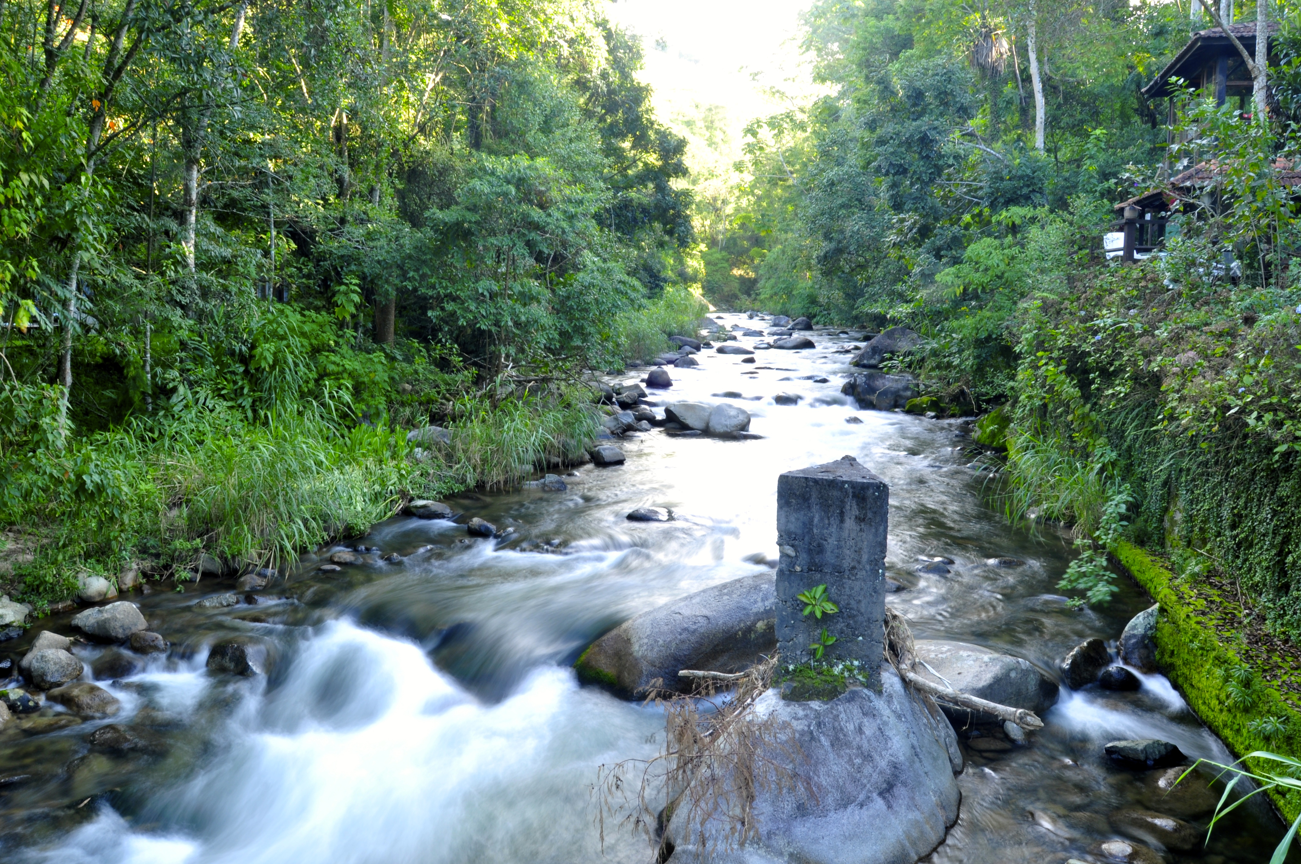 Essa foto foi feita numa ponte que liga Maringá de MG com Maringá do RJ